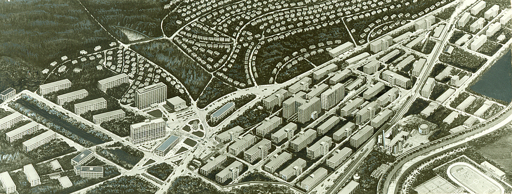 Zlin